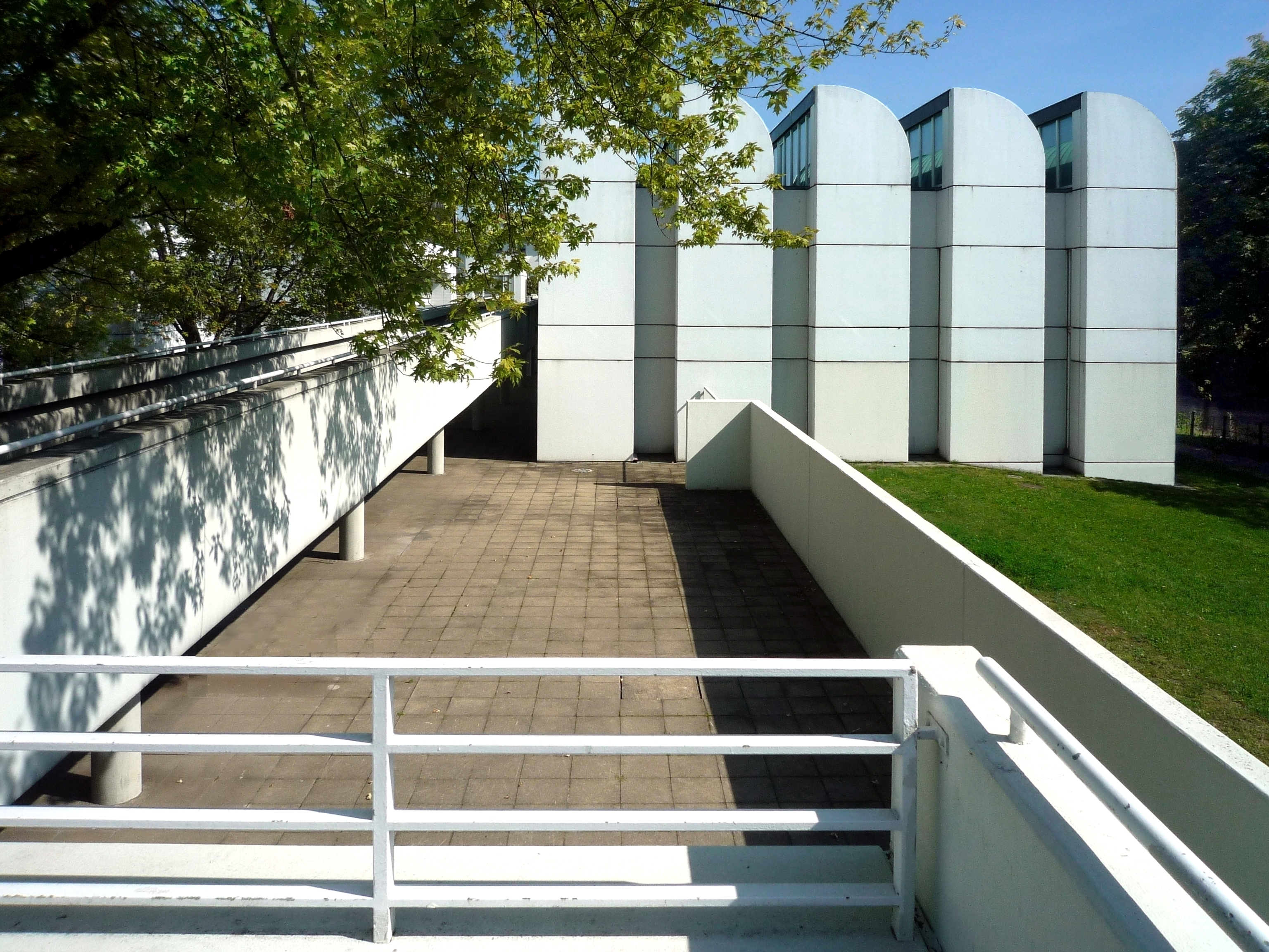 Bauhaus-Archiv, Museum für Gestaltung. Klingelhöfer Str. 14, 10785 Berlin. Fertiggestellt 1979 nach einem modifizierten Entwurf, den Walter Gropius 1964 ursprünglich für einen Standort in Darmstadt geliefert hatte. Seit 1997 unter Denkmalschutz. OBJ-Dok-Nr.: 090 50 377. Ansicht von Westen.